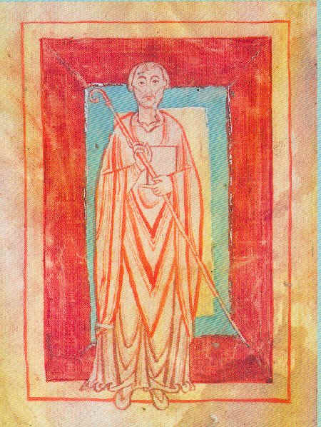 Wilhelm of Hirsau - Reichenbacher Schenkungsbuch (Württembergische Landesbibliothek Stuttgart, Cod. hist. 4° 147)